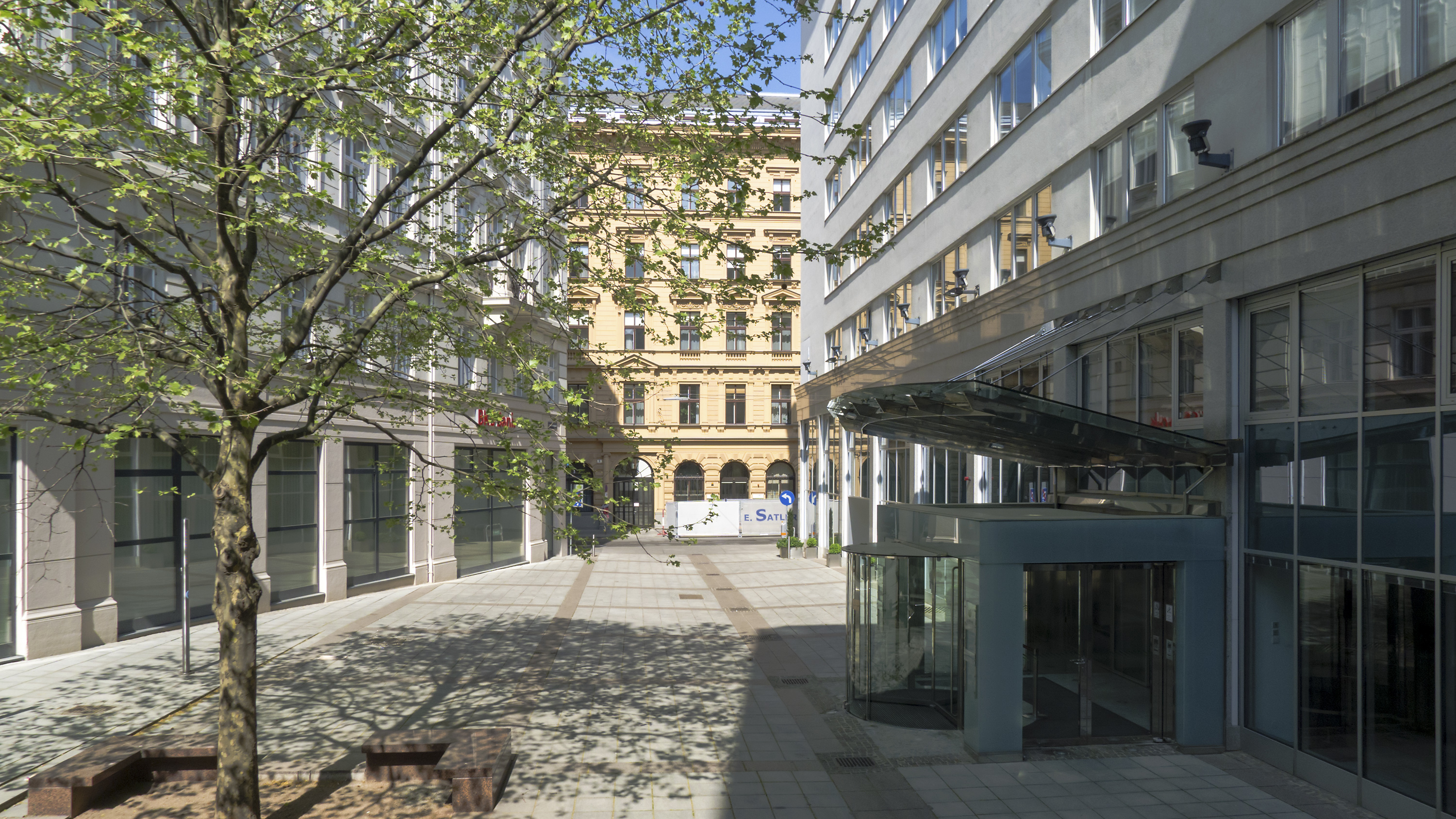 Wächtergasse in Wien 1 bei Nr. 1 Richtung Nordwesten